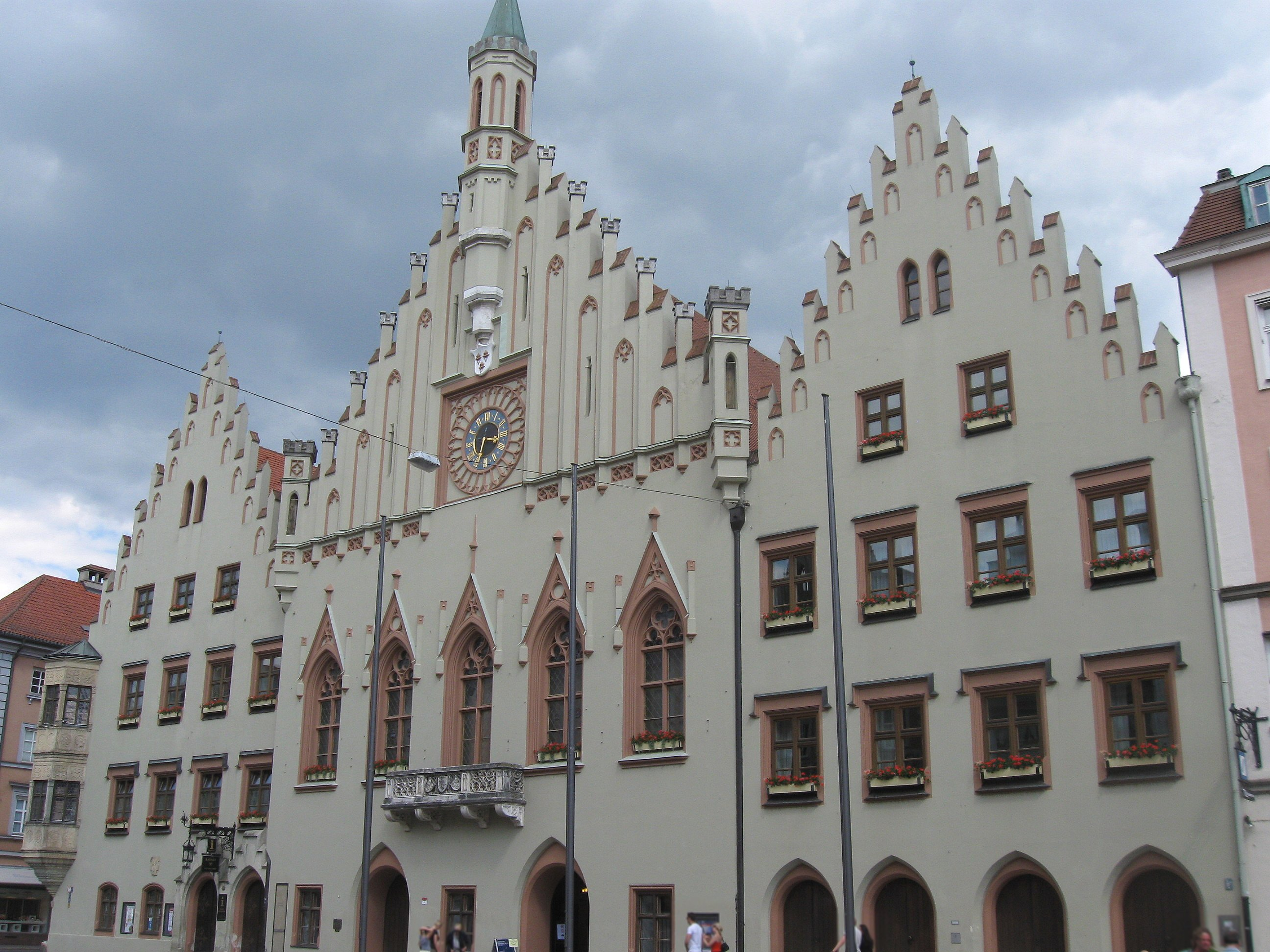 Altstadt 315; Rathaus, weitläufige Anlage, entstanden aus der Vereinigung dreier Häuser, Mittelbau 1380 als Rathaus erworben, 1452 um Eckhaus zur Grasgasse erweitert, 1570/71 mit Renaissanceerker umgestaltet, 1503 um das Patrizierhaus der Scharsacher mit dem 1475 belegten Tanzhaus erweitert, neugotische Fassade 1860/61 von Leonhard Schmidtner, Neugestaltung des Rathaussaal mit Wandmalereien 1882/83 von Georg Hauberrisser. D-2-61-000-113